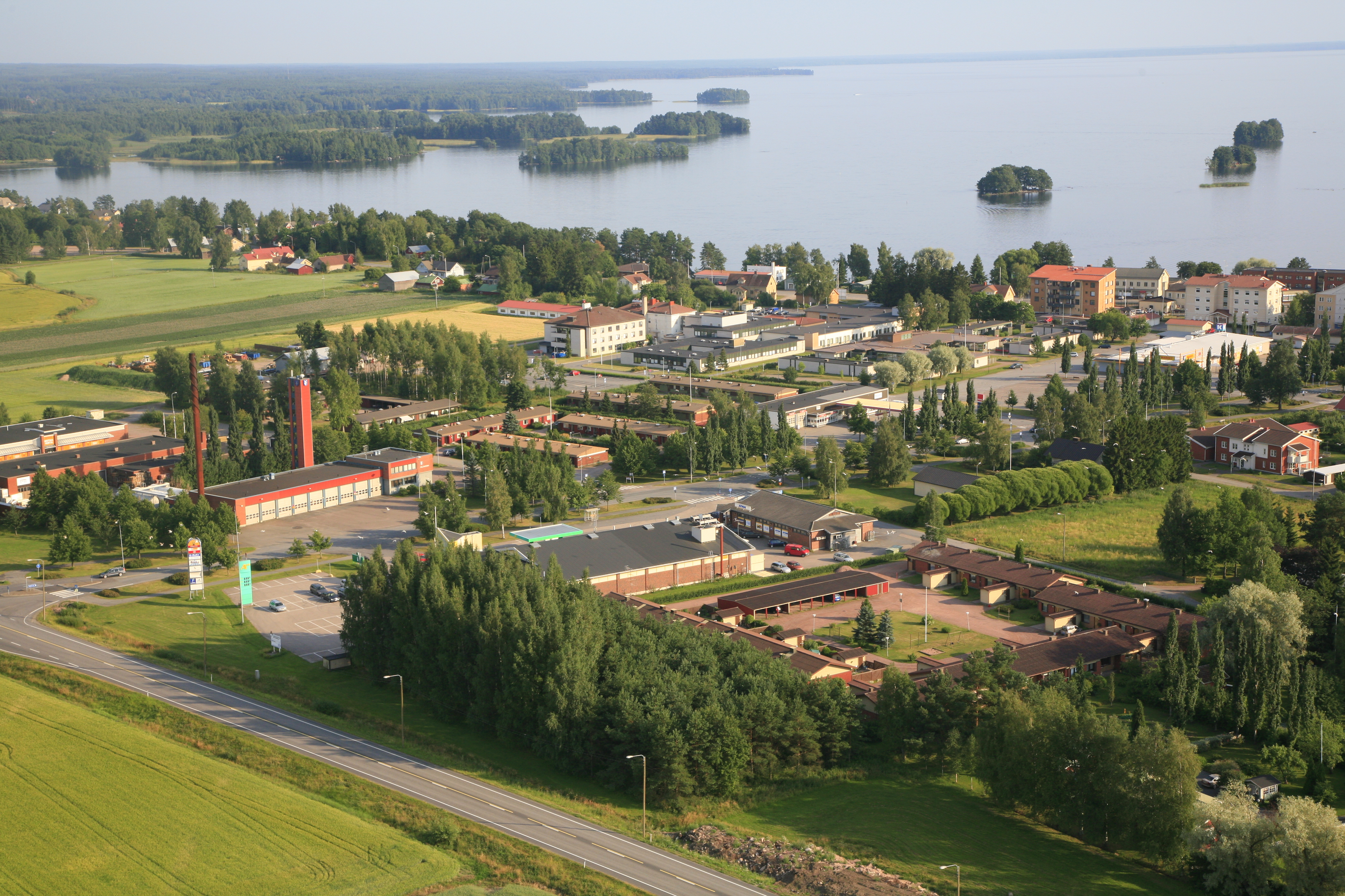 Säkylä ilmasta